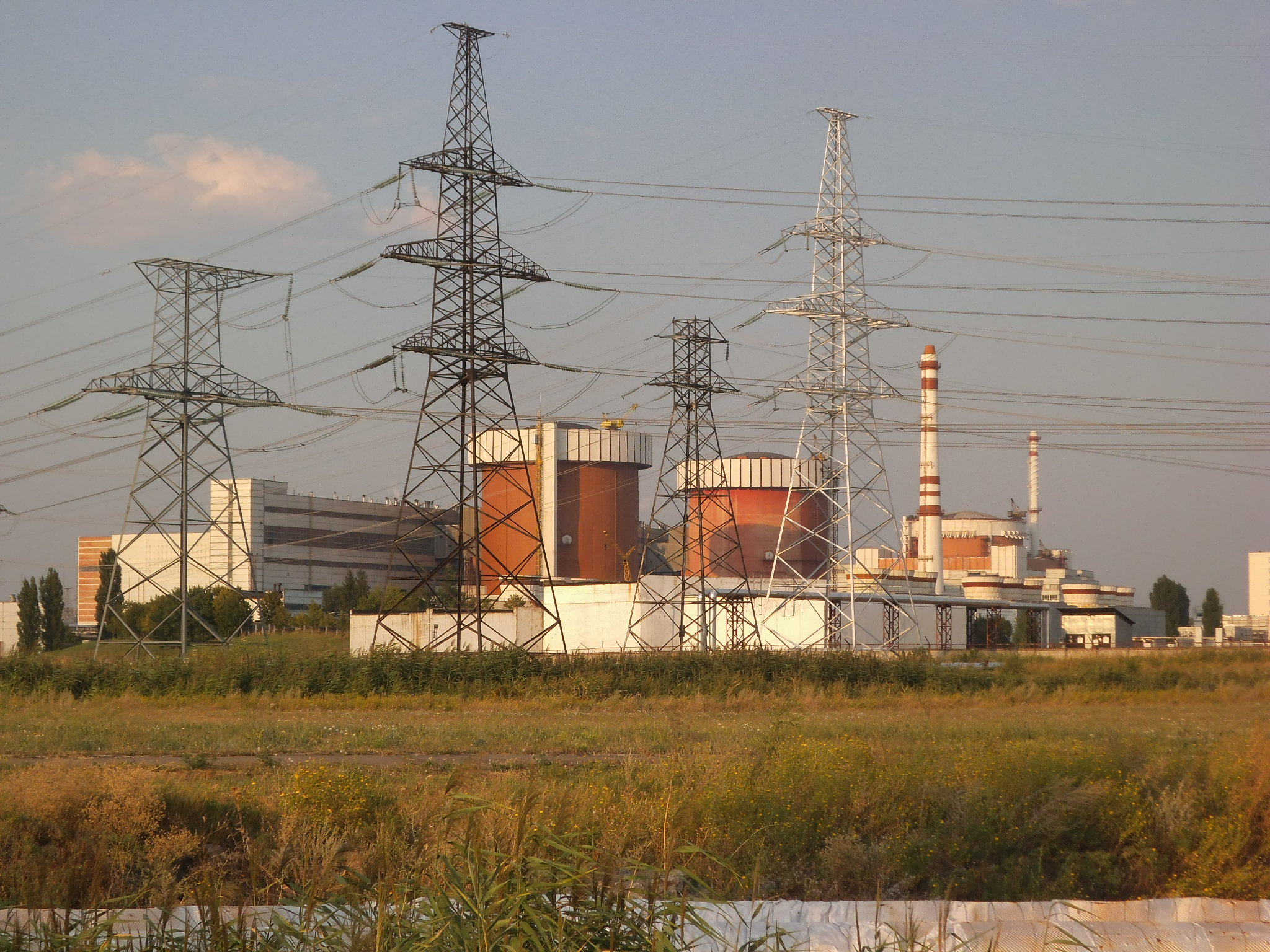 Південноукраїнська АЕС